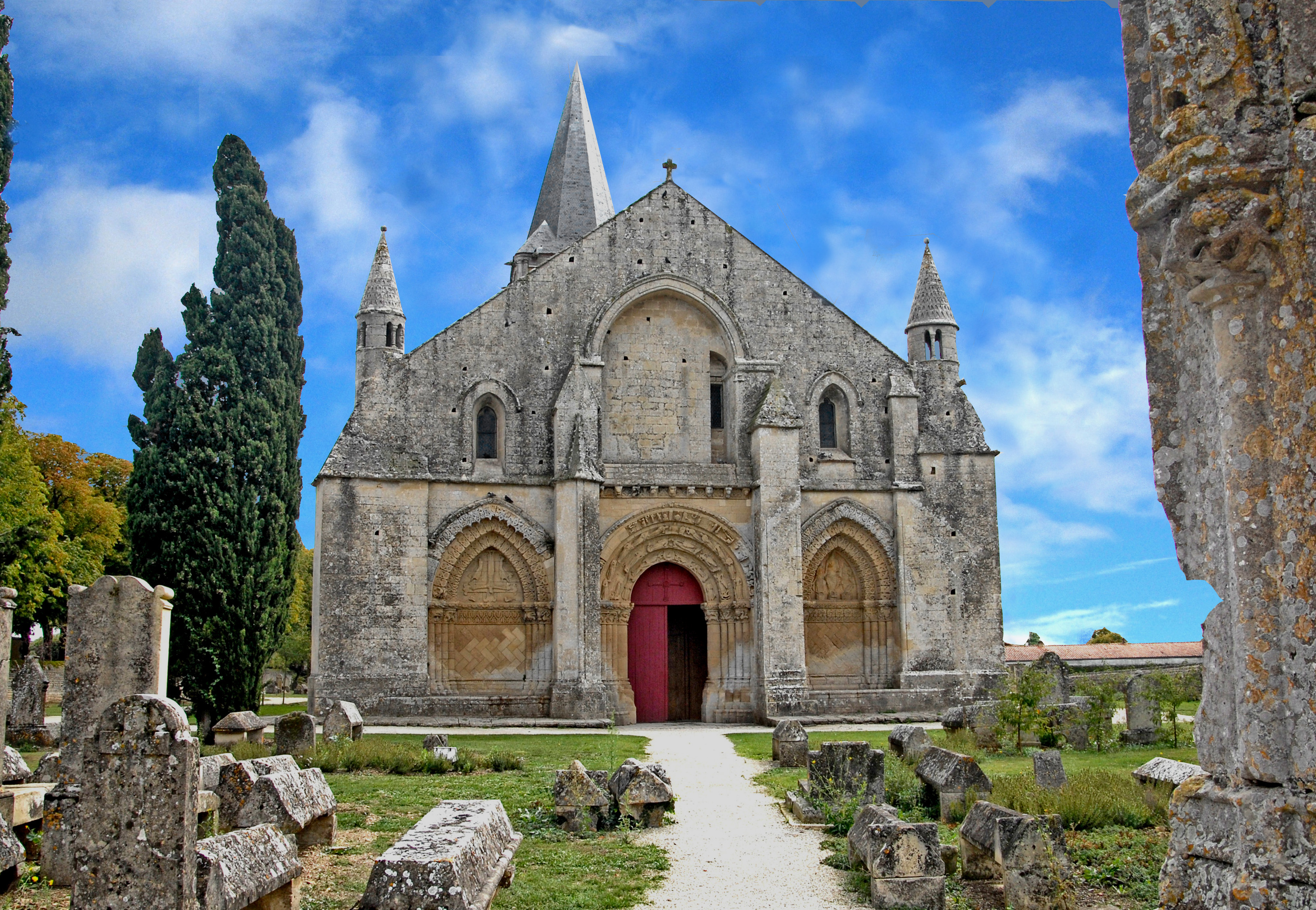 St.-Pierre Aulnay,Überblick von Westen